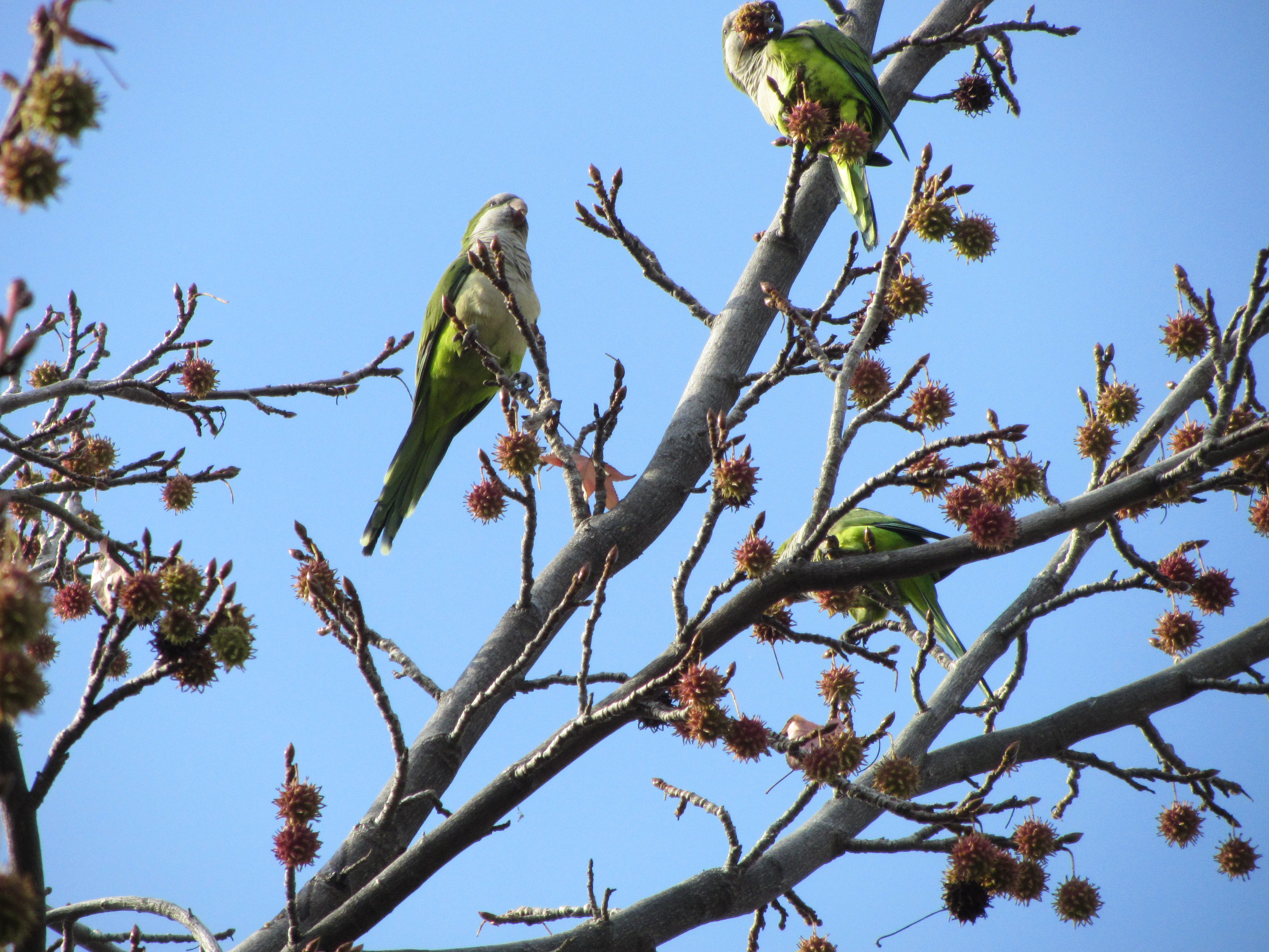 Cotorras argentinas en el Parque El Llano de San Miguel, Chile